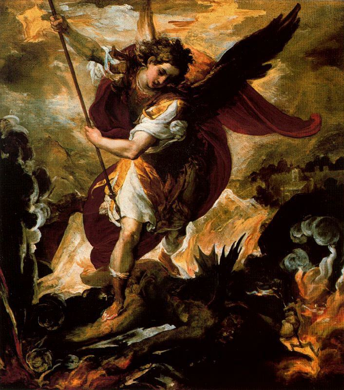 San Miguel arcángel derrota a Luciferlabel QS:Les,"San Miguel arcángel derrota a Lucifer"